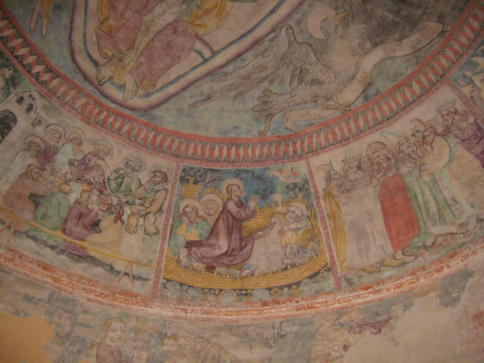 Interior of Rotunda, Selo (Prekmurje, Slovenia)